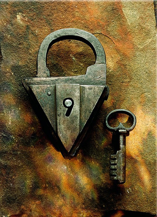 Ein Bügelschloss aus den Anfängen der Firma Burg-Wächter.